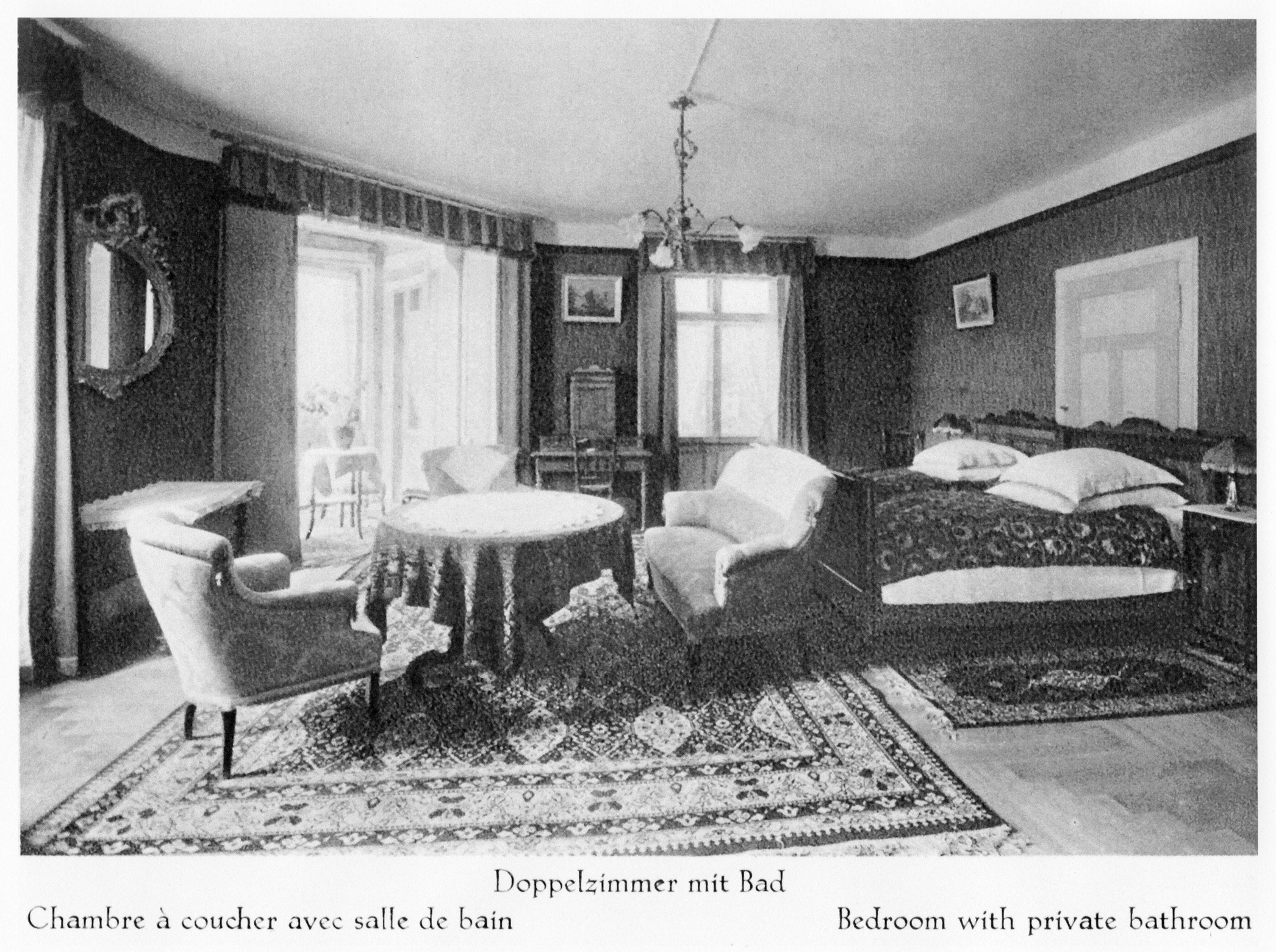 Hotel Pontresina: Zimmer mit Bad, ca. 1910